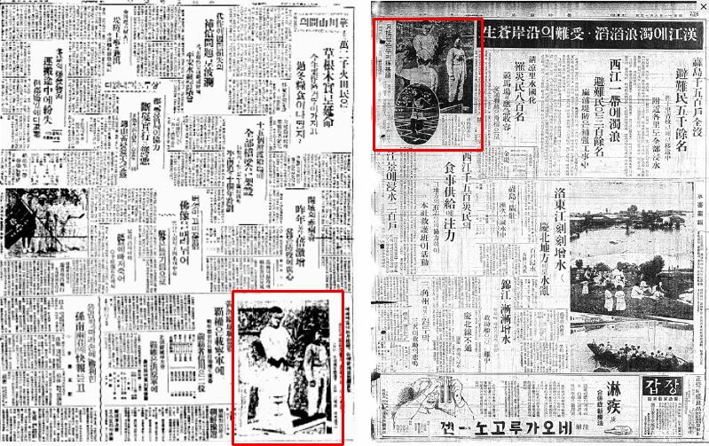 조선말: 1936년 8월 13일자 왼쪽 조선중앙일보와 오른쪽 동아일보의 지방판 기사